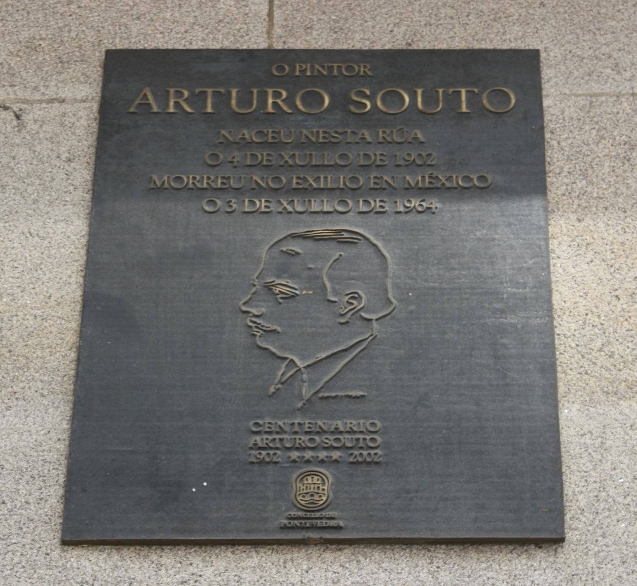 Placa na rúa na que naceu Arturo Souto, en Pontevedra